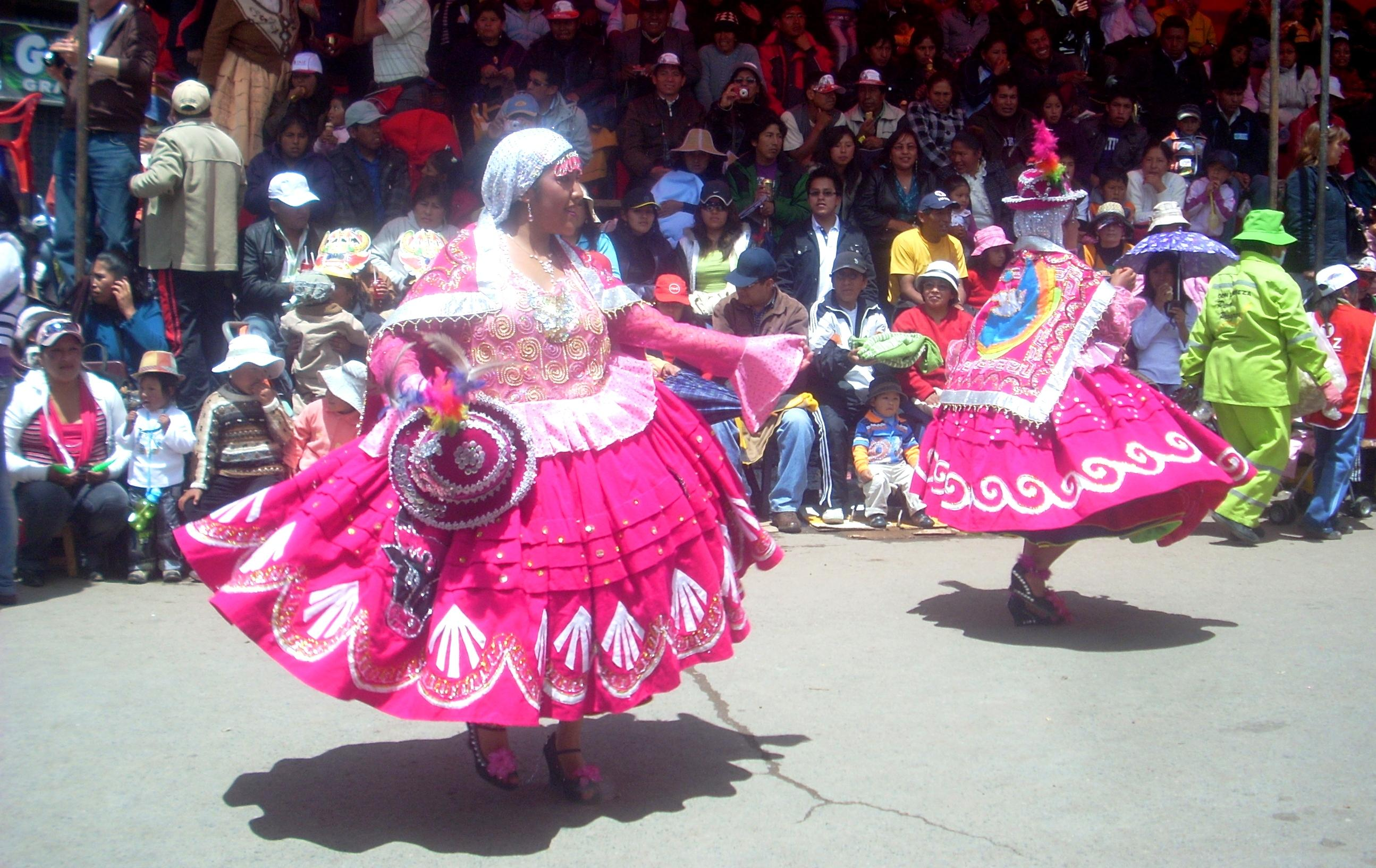 Festividad Candelaria De PUNO-PERU Danza: Waca Waca (Zona Aymara-Provincias)